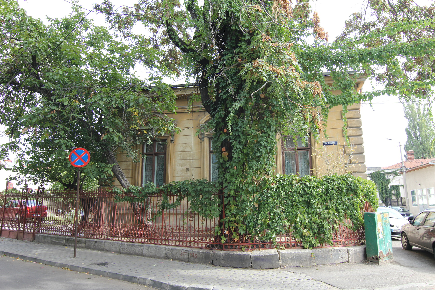 Casă pe Str Romulus